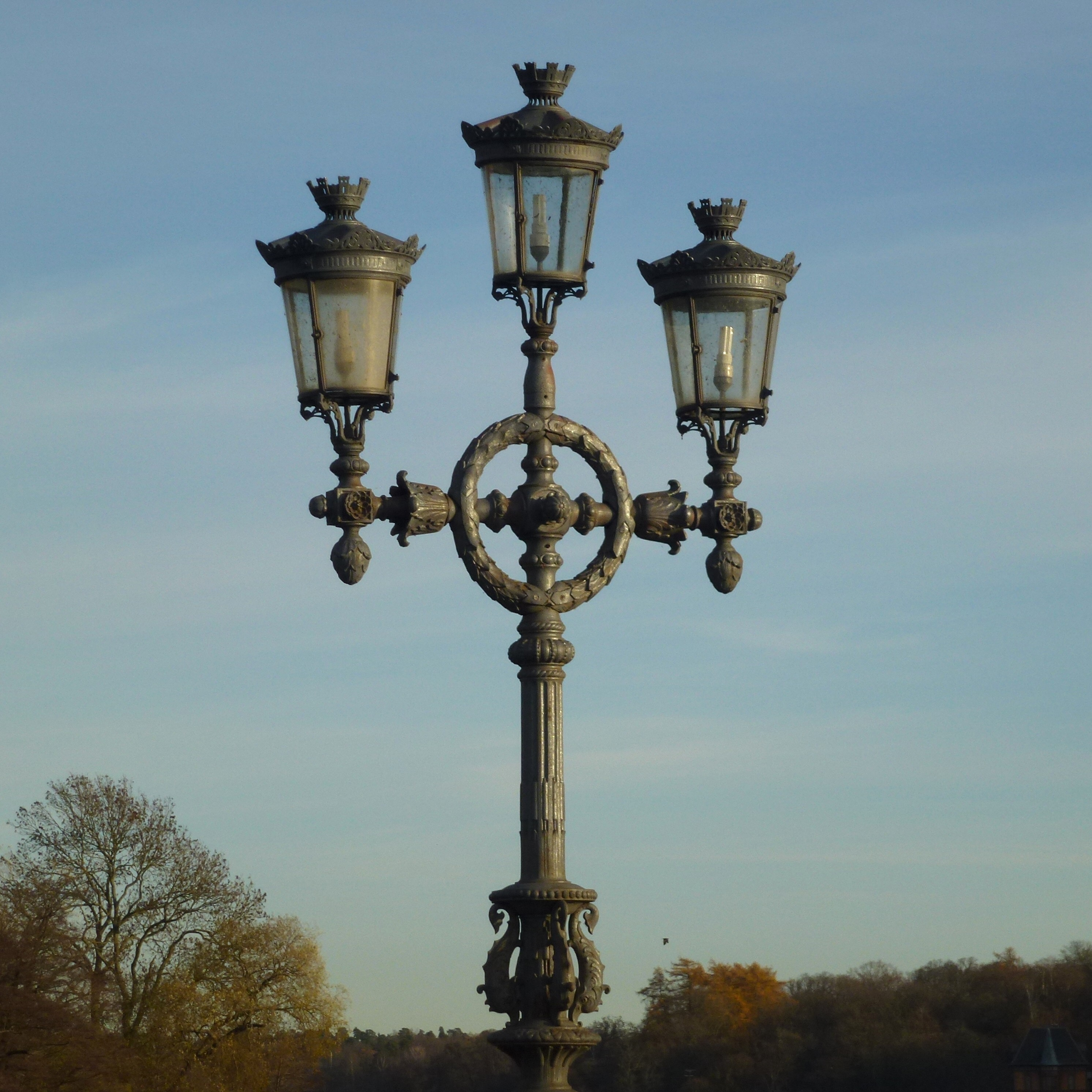 Djurgårdsbron kandelaber